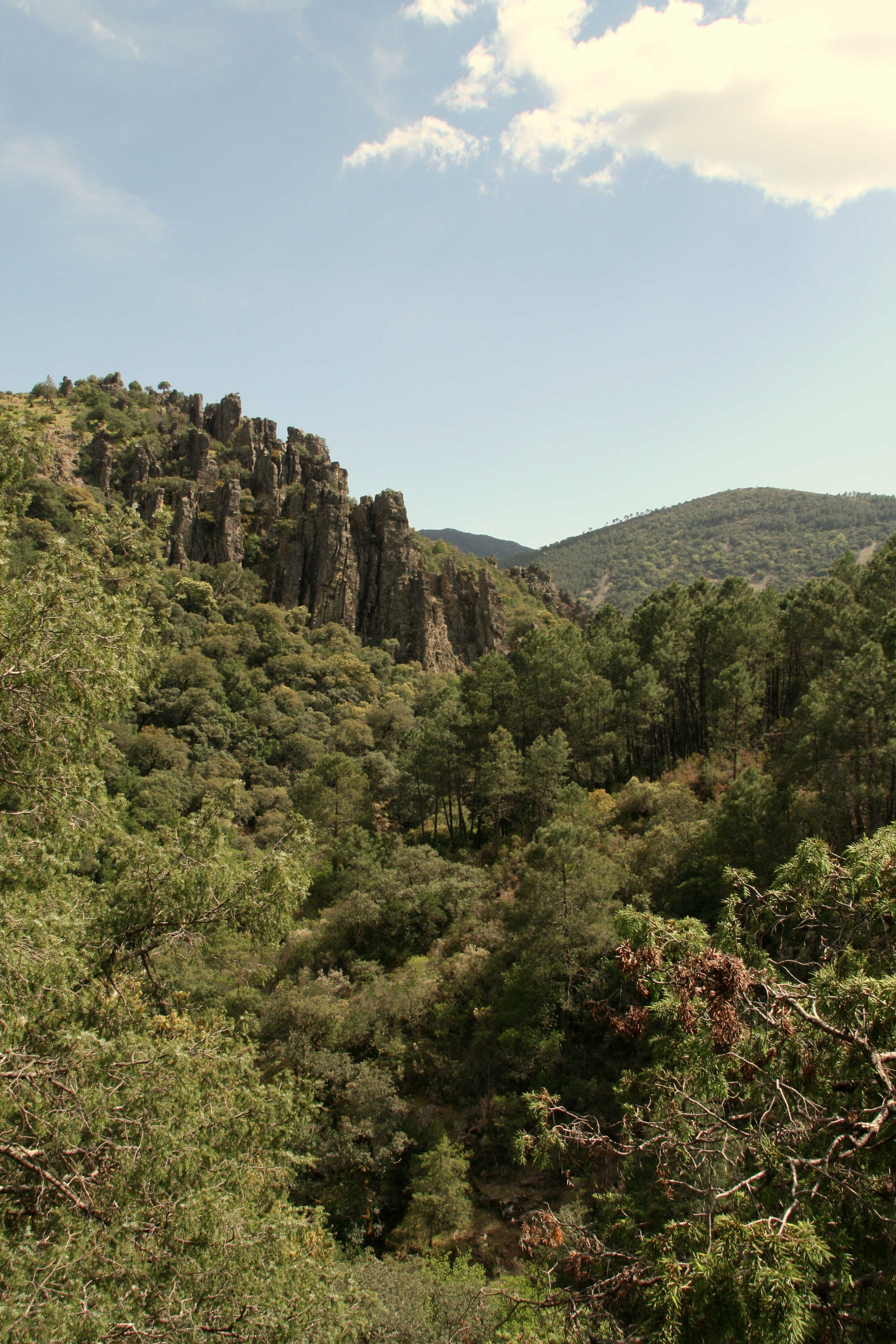 Valle del río Batuecas This is a photography of a Site of Community Importance in Spain with the ID: ES4150107. Natura2000 entry, EEA entry